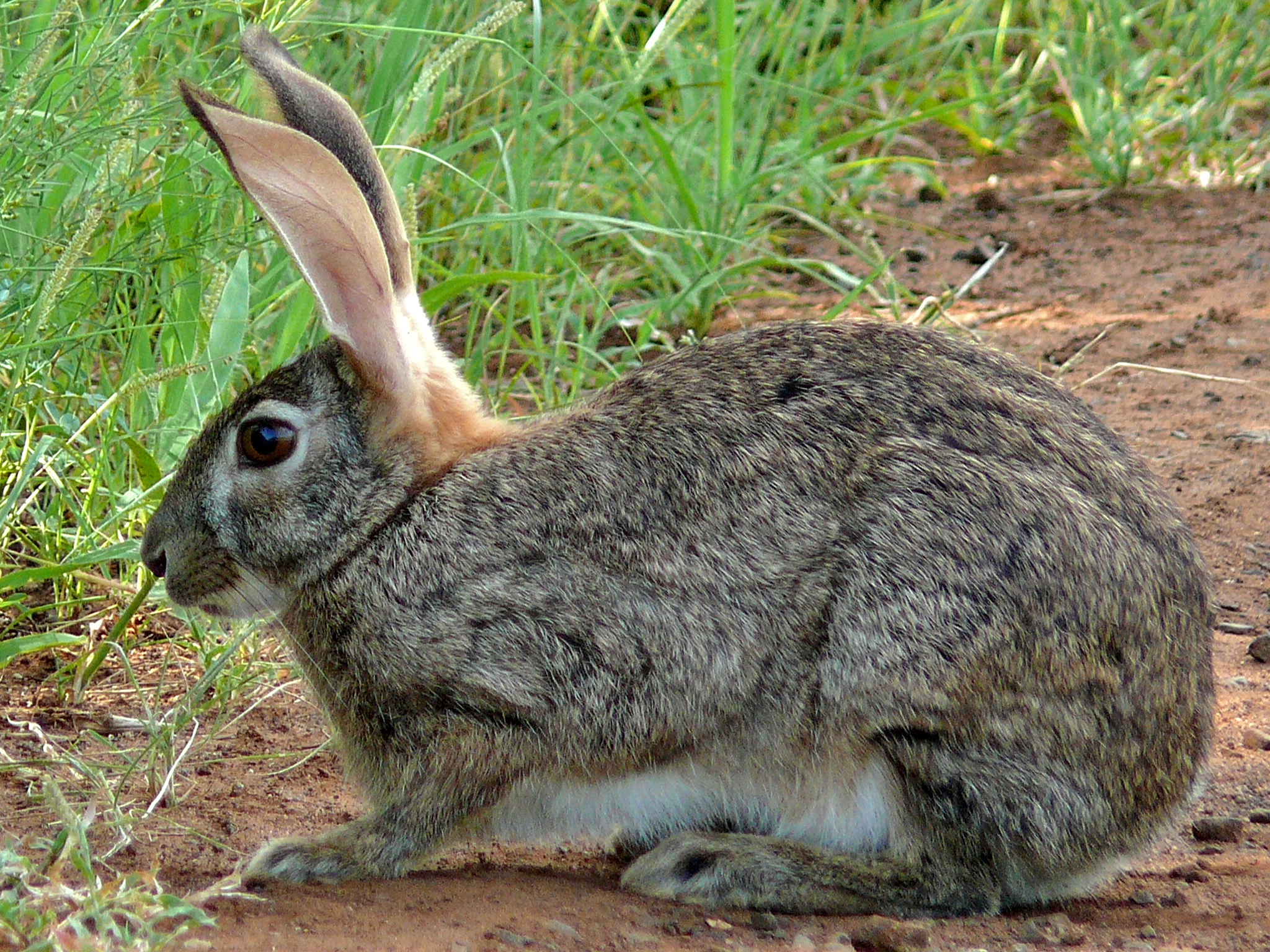 S26 Bume Road, Kruger NP, SOUTH AFRICA